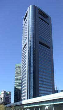 汐留メディアタワー